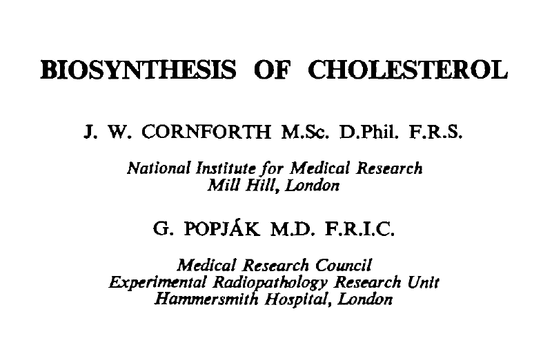 Ausriss aus einer Veröffentlichung von John W. Cornforth und George Joseph Popják aus dem Jahr 1958 (British Medical Bulletin, 1958, 14(3):221–226)